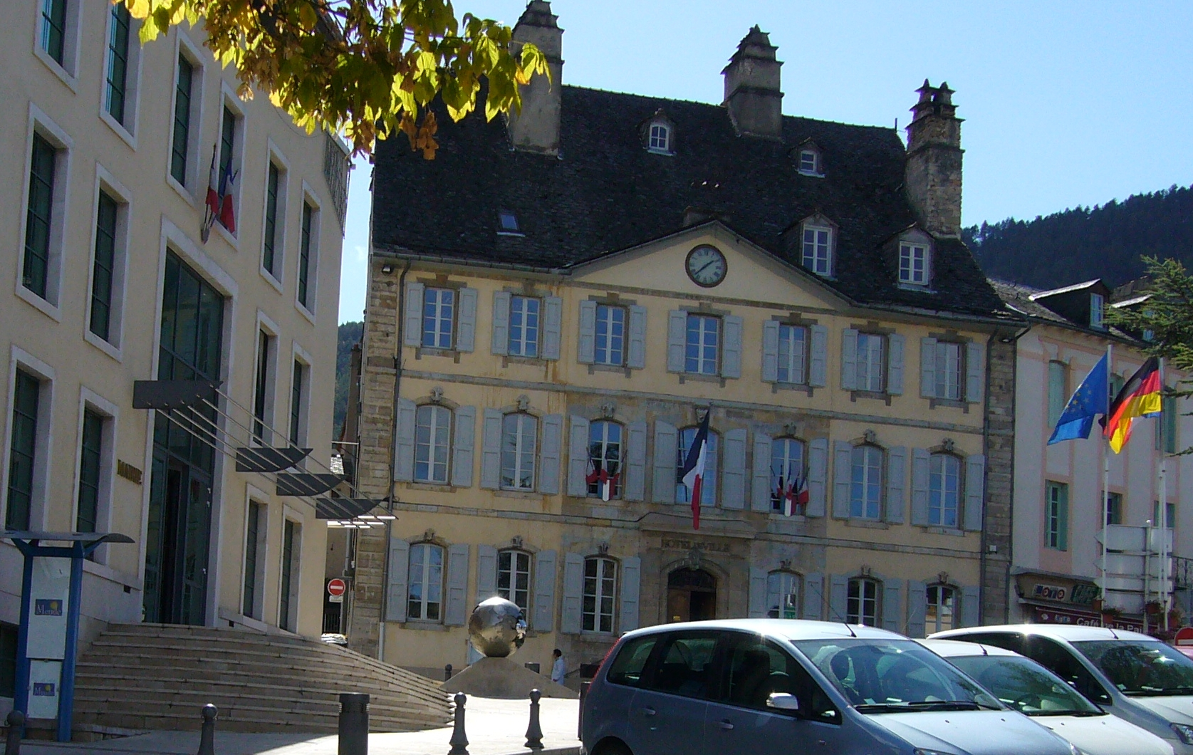 mairie de la ville de Mende, Lozère, France